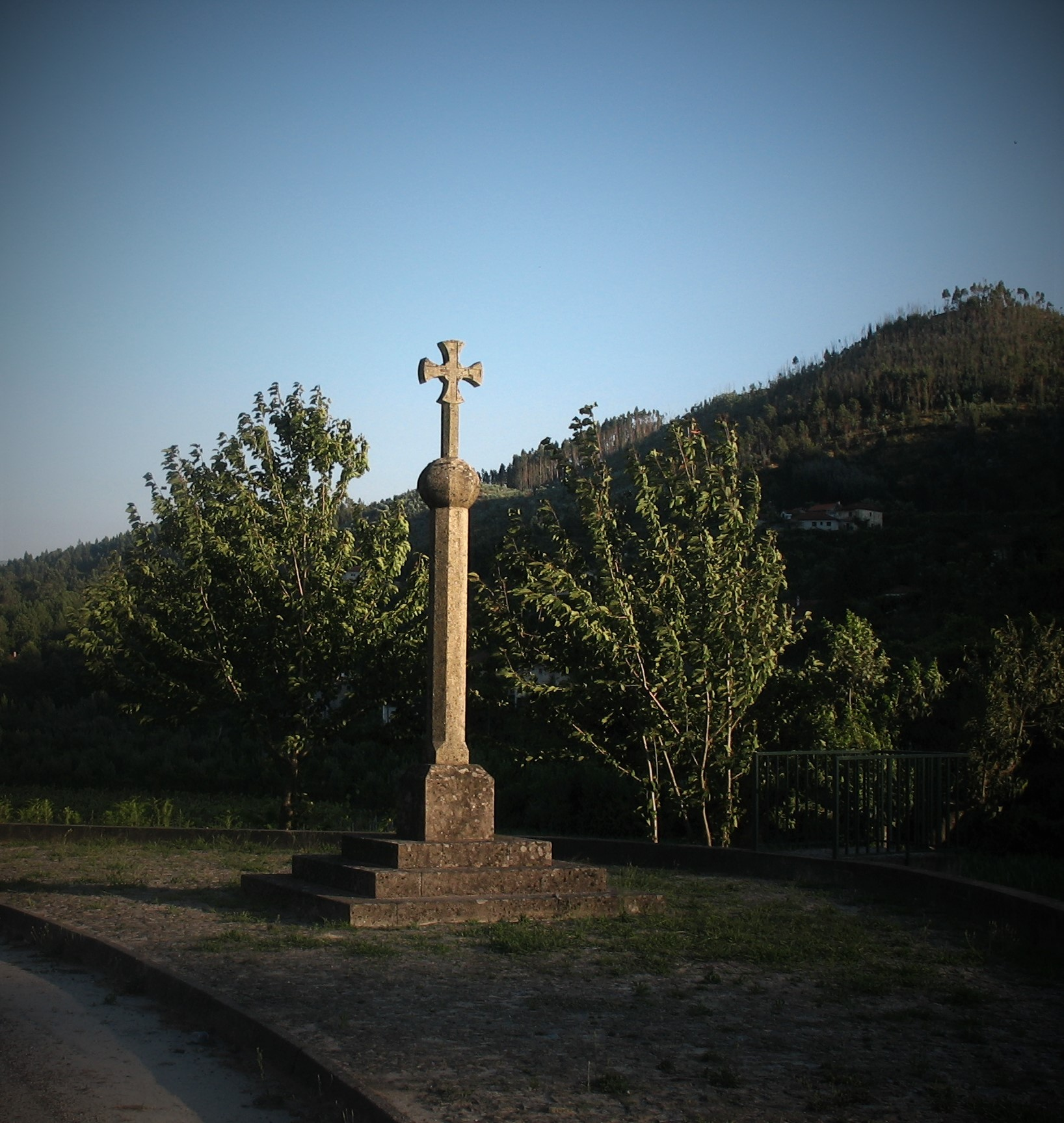 Amarante Freixo de Baixo Cruzeiro